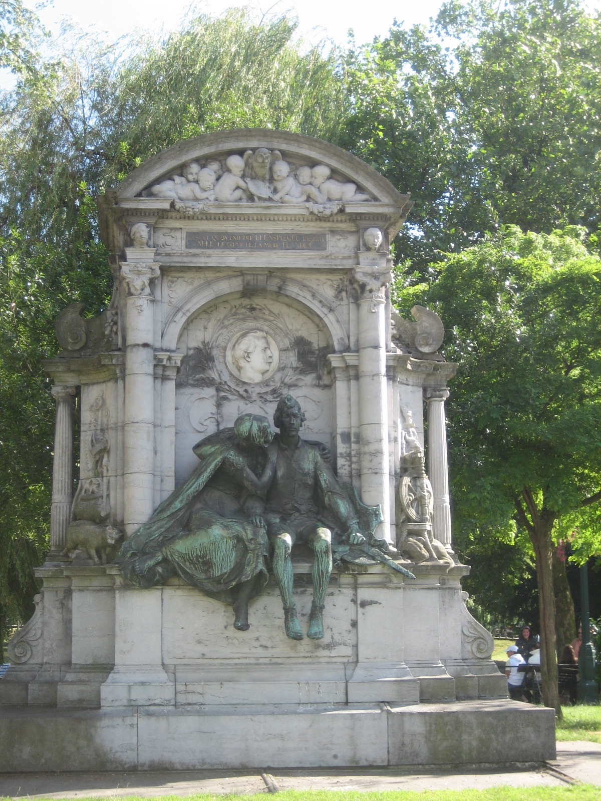 Monument fir de Charles De Coster op der Flagey-Plaz beim Weier vun Ixelles/Elsene; Juli 2009.